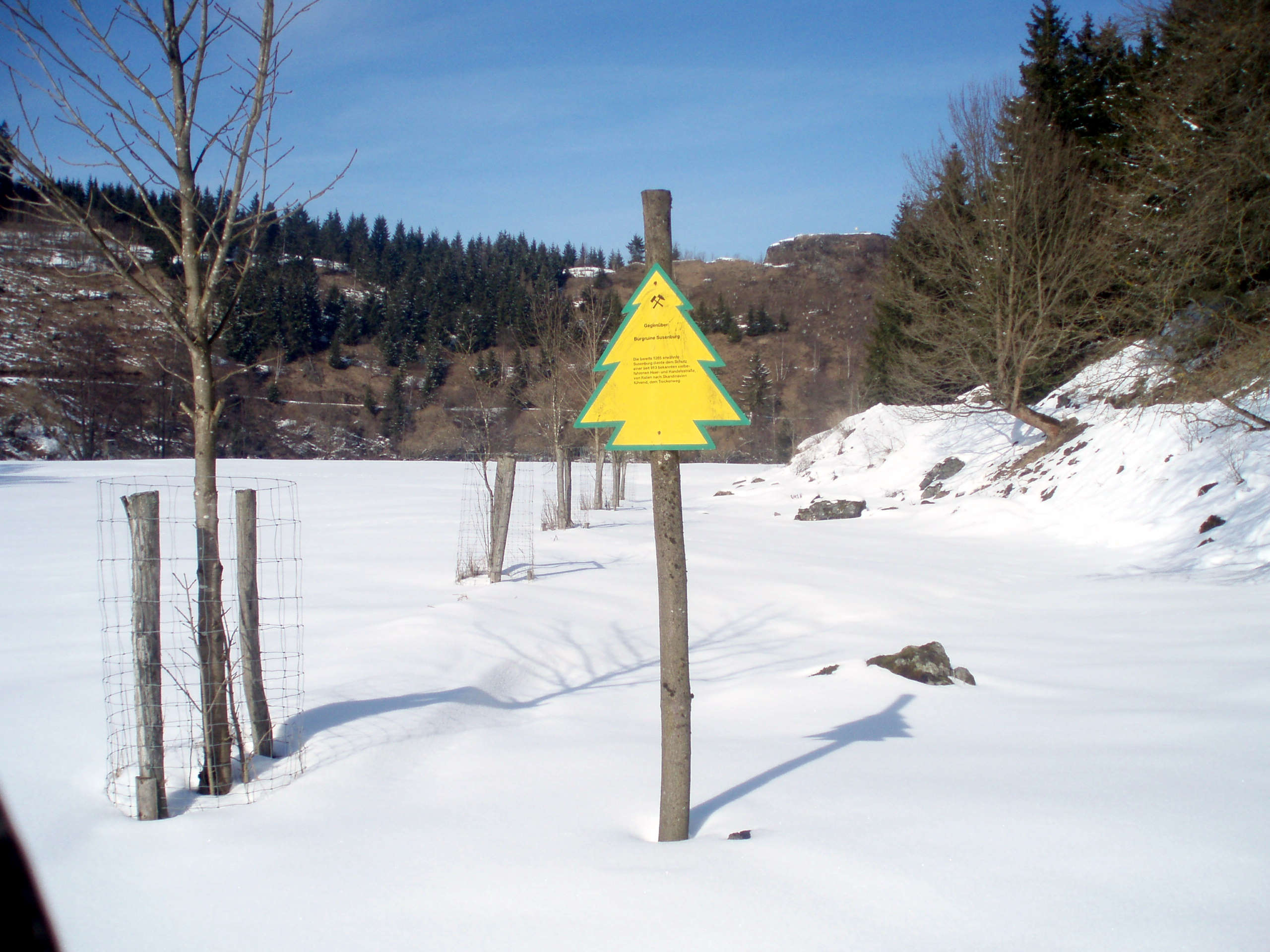 Blick zur Susenburg mit Dennert-Tanne